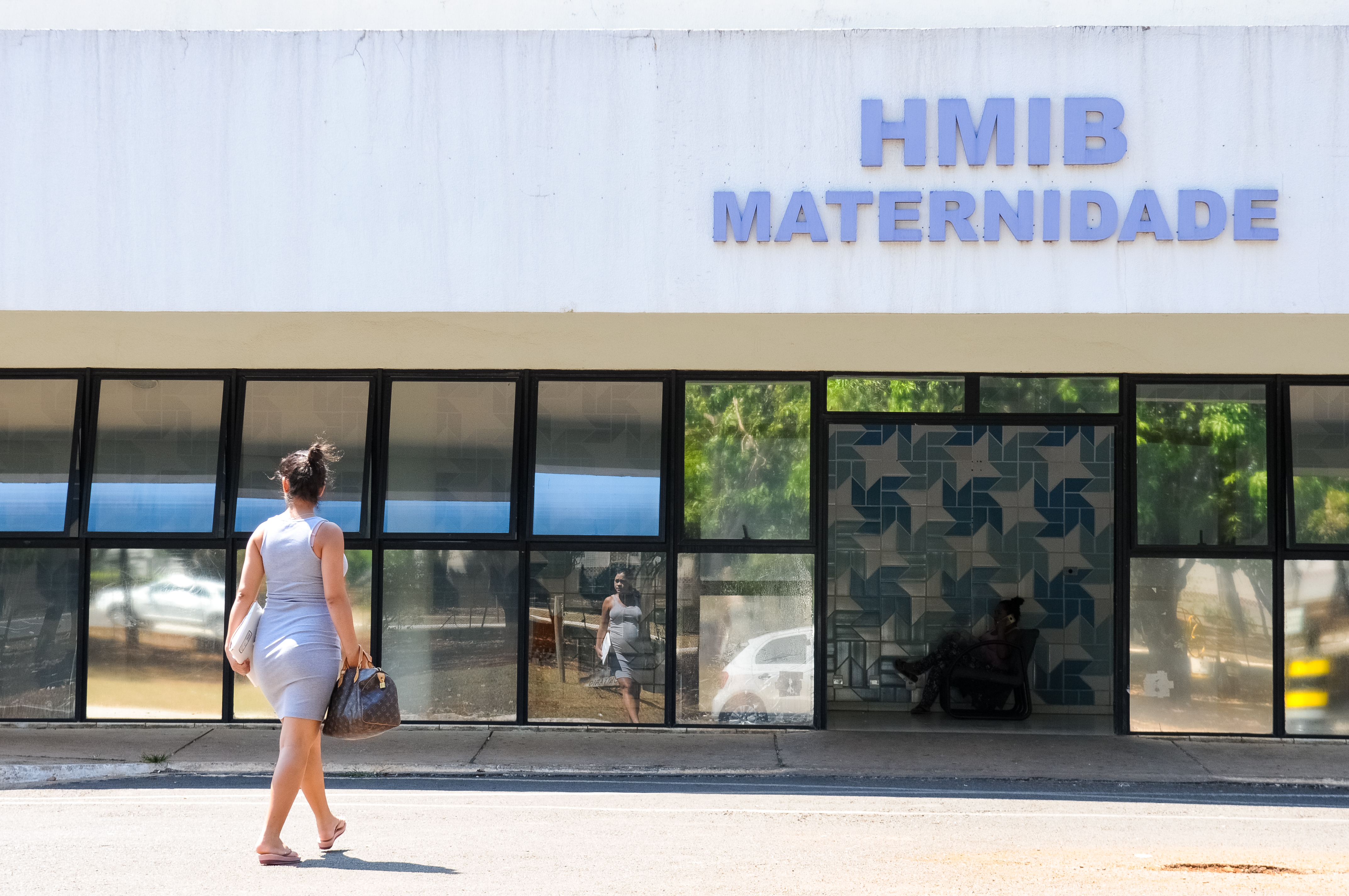 Hospital Materno Infantil de Brasília (HMIB). Foto: Paulo H. Carvalho/Agência Brasília